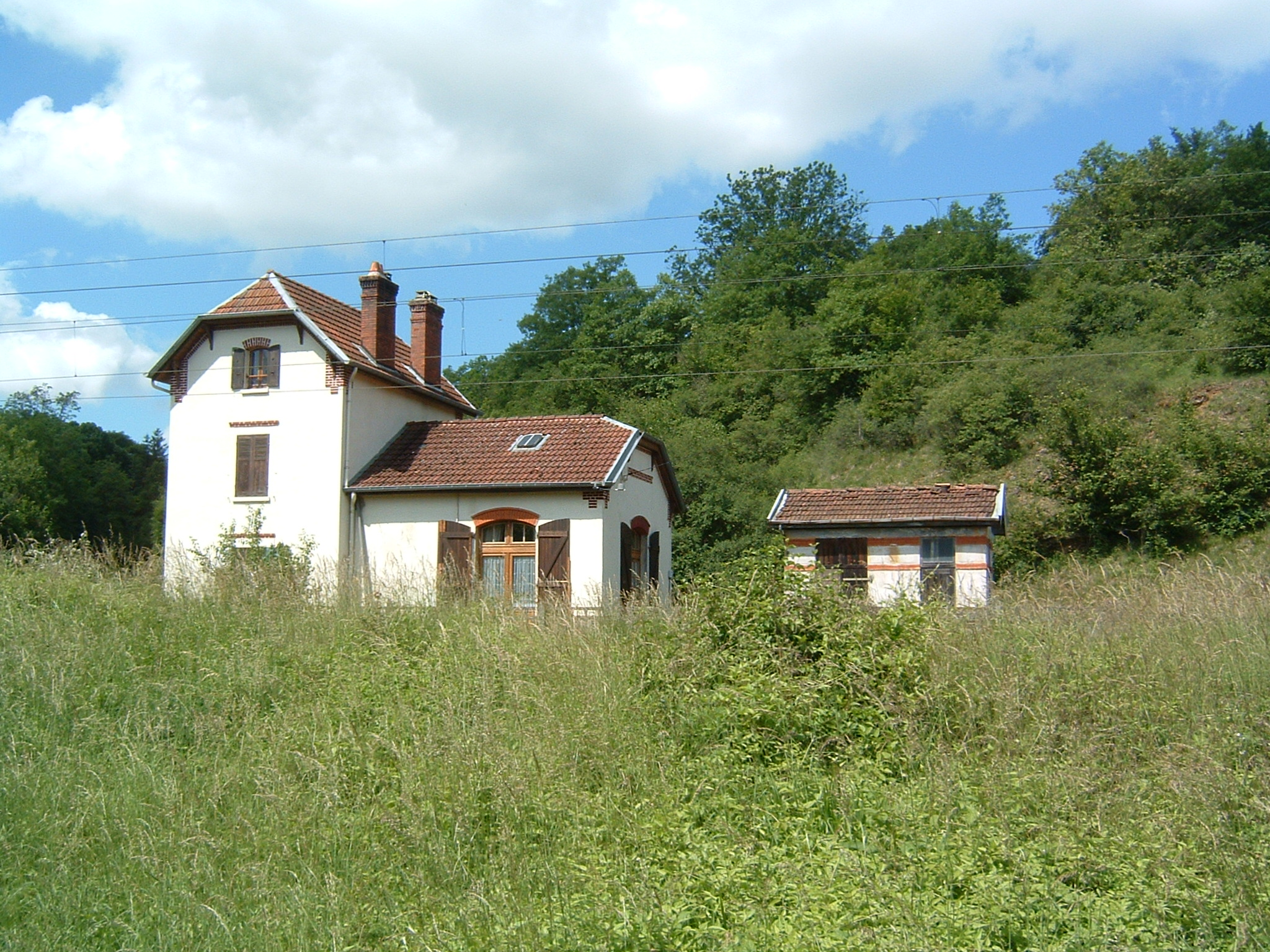 L'ancienne gare ferroviaire de Jaulny